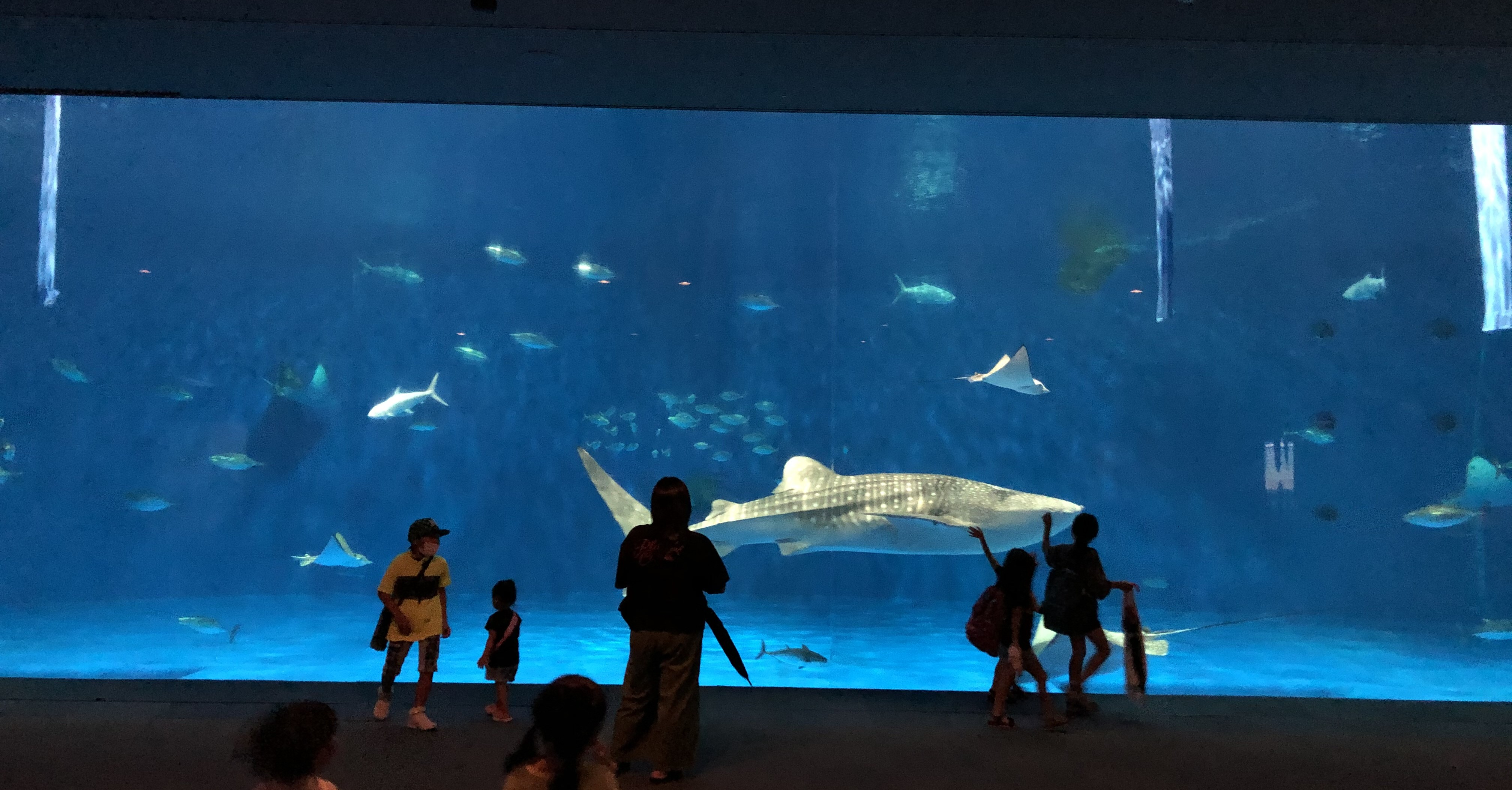 いおワールドかごしま水族館の黒潮大水槽とja:ジンベイザメ